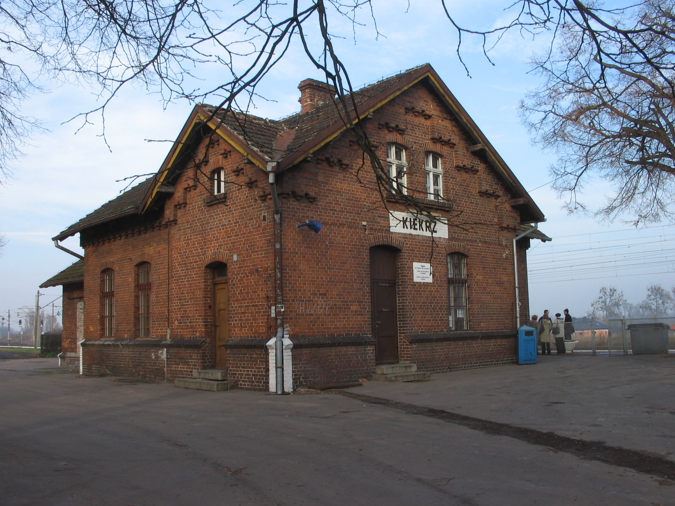 budynek stacji Kiekrz - widok od strony miasta